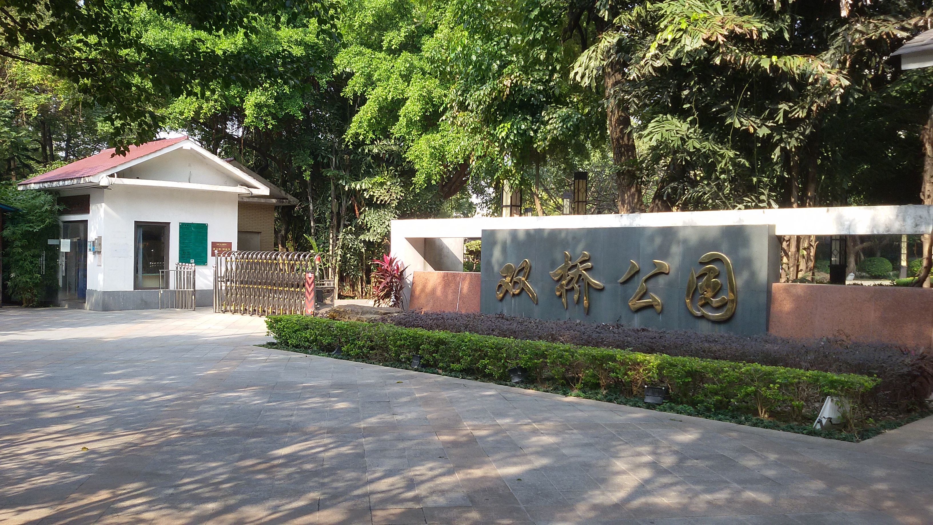 粵語: 廣州雙橋公園（西園）